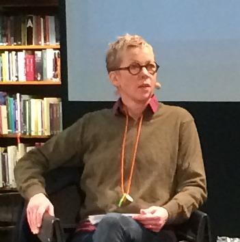 Katti Hoflin i Stadsbibliotekets Rotunda 7 november 2017